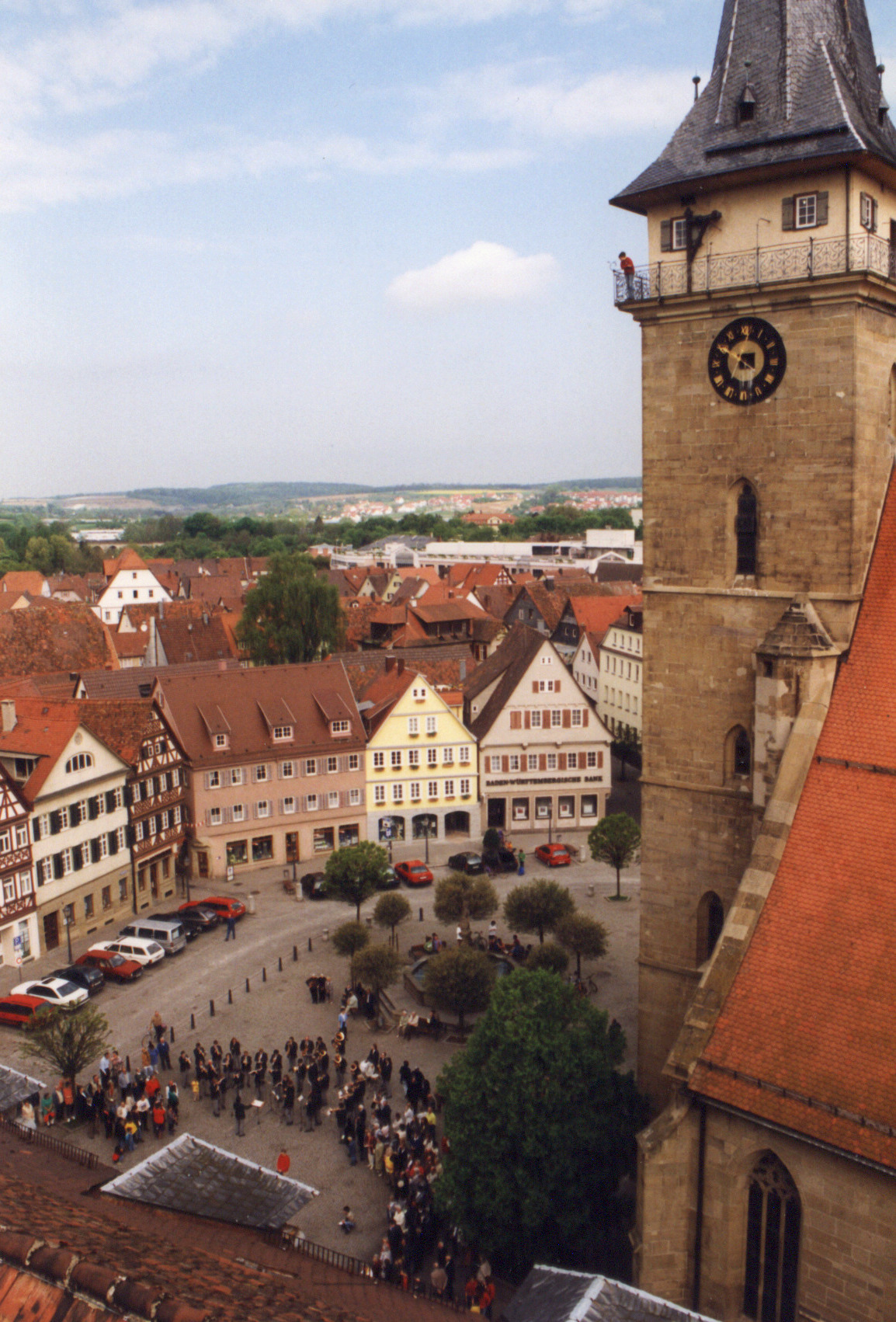 Öhringen: Blick über den Marktplatz, gesehen vom Turm des Schlosses